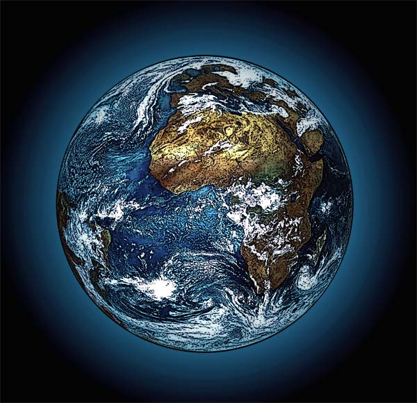 View on Earth - Blick auf den Planeten Erde. Author : Heikenwaelder Hugo, Austria. Ask for Details : . Permission : Heikenwaelder Hugo (Author)